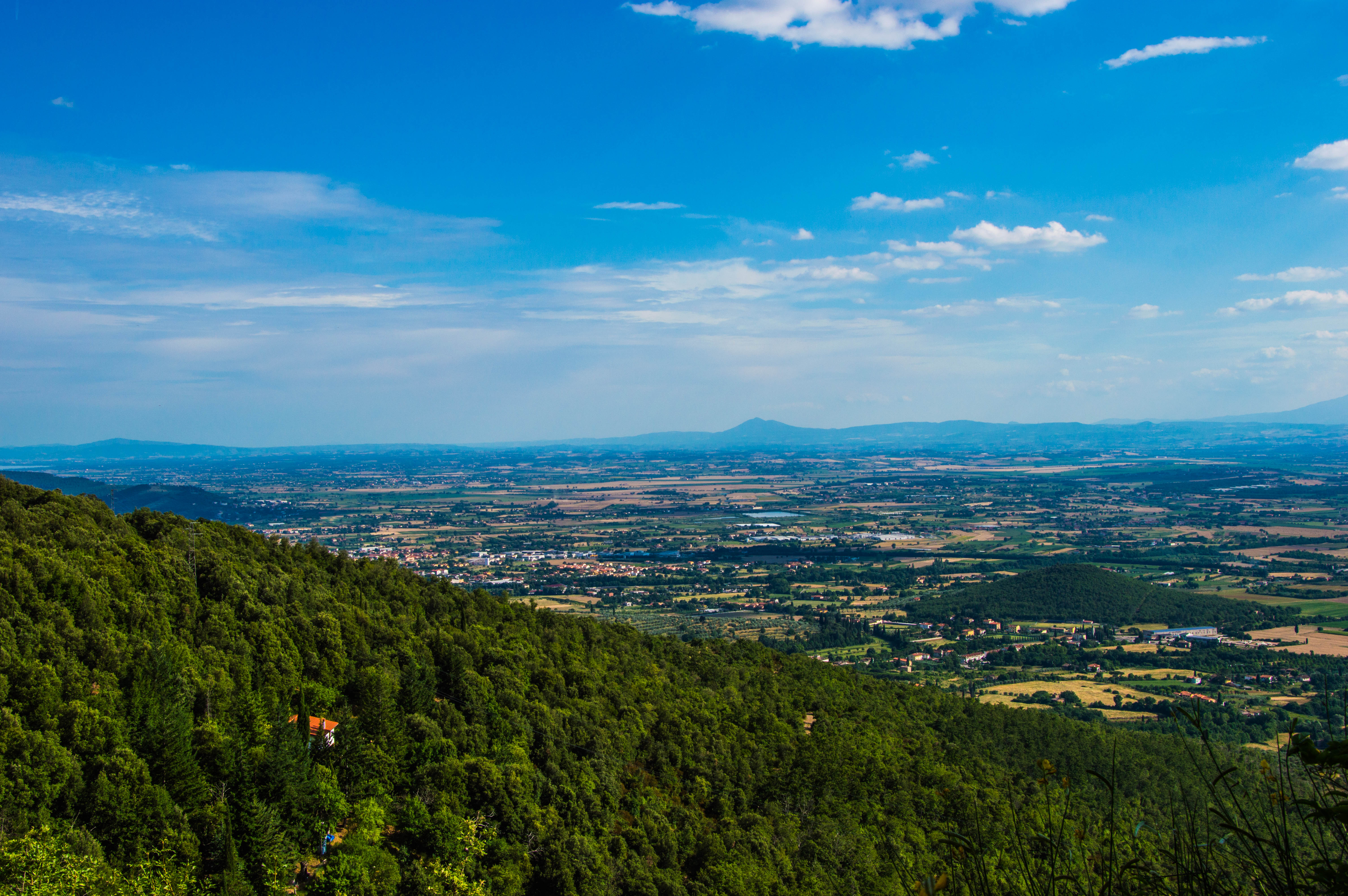 Panorama della Val di Chiana dal Monte Lignano (AR)